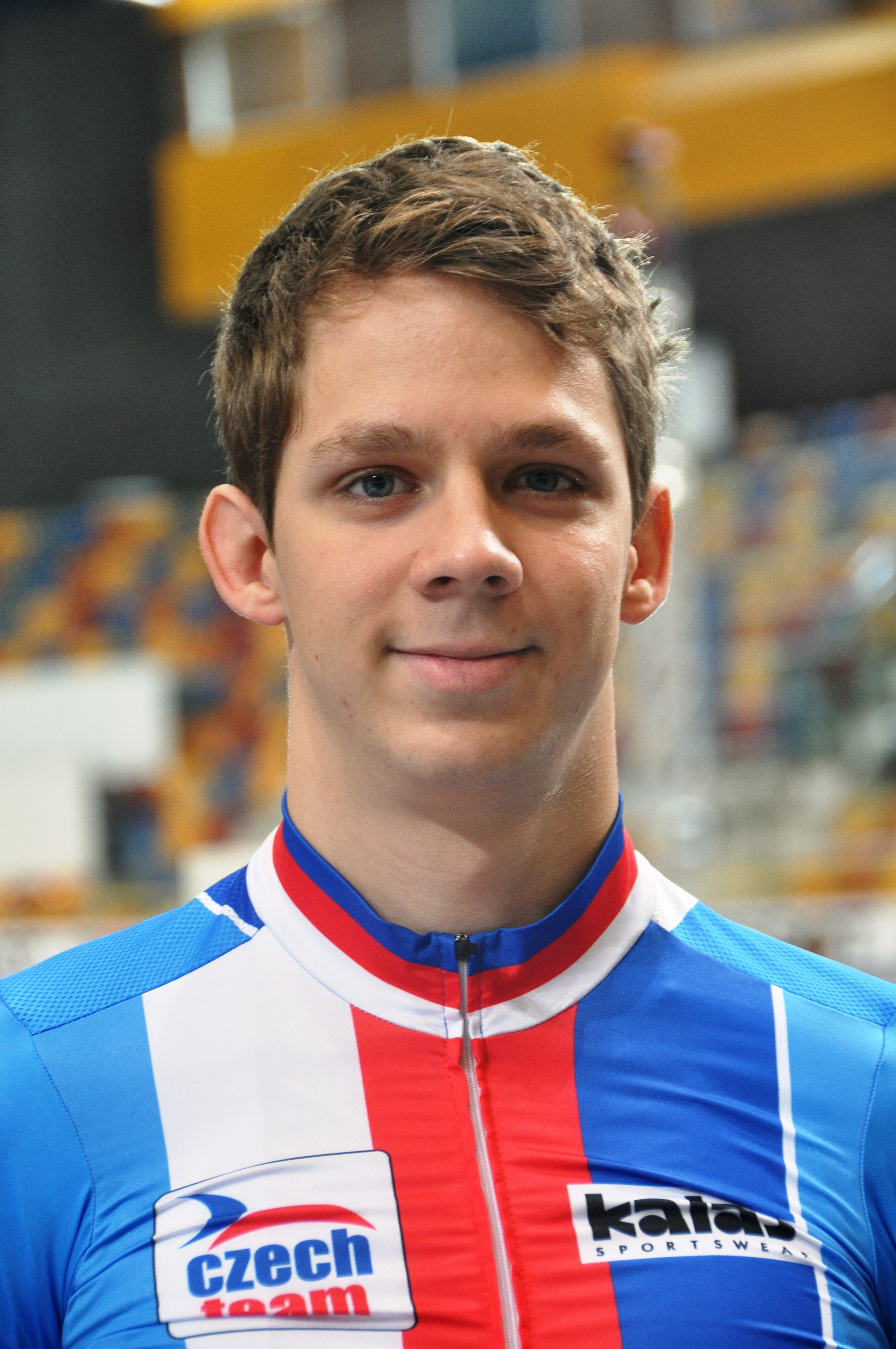 Nicolas Pietrula, tschechischer Radsportler